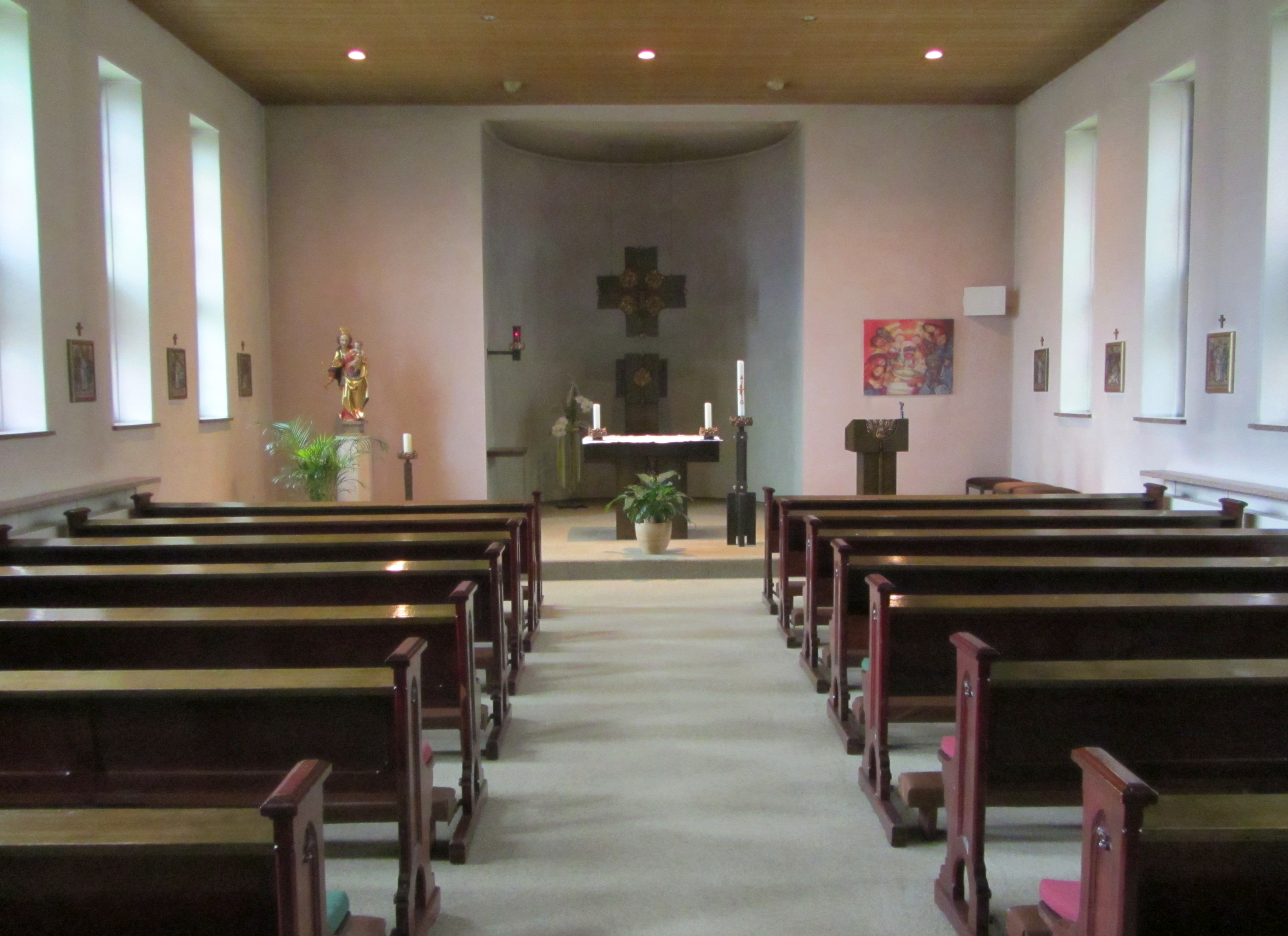 Krankenhaus Neu-Mariahilf in Göttingen: frühere Kapelle, 2016 abgerissen